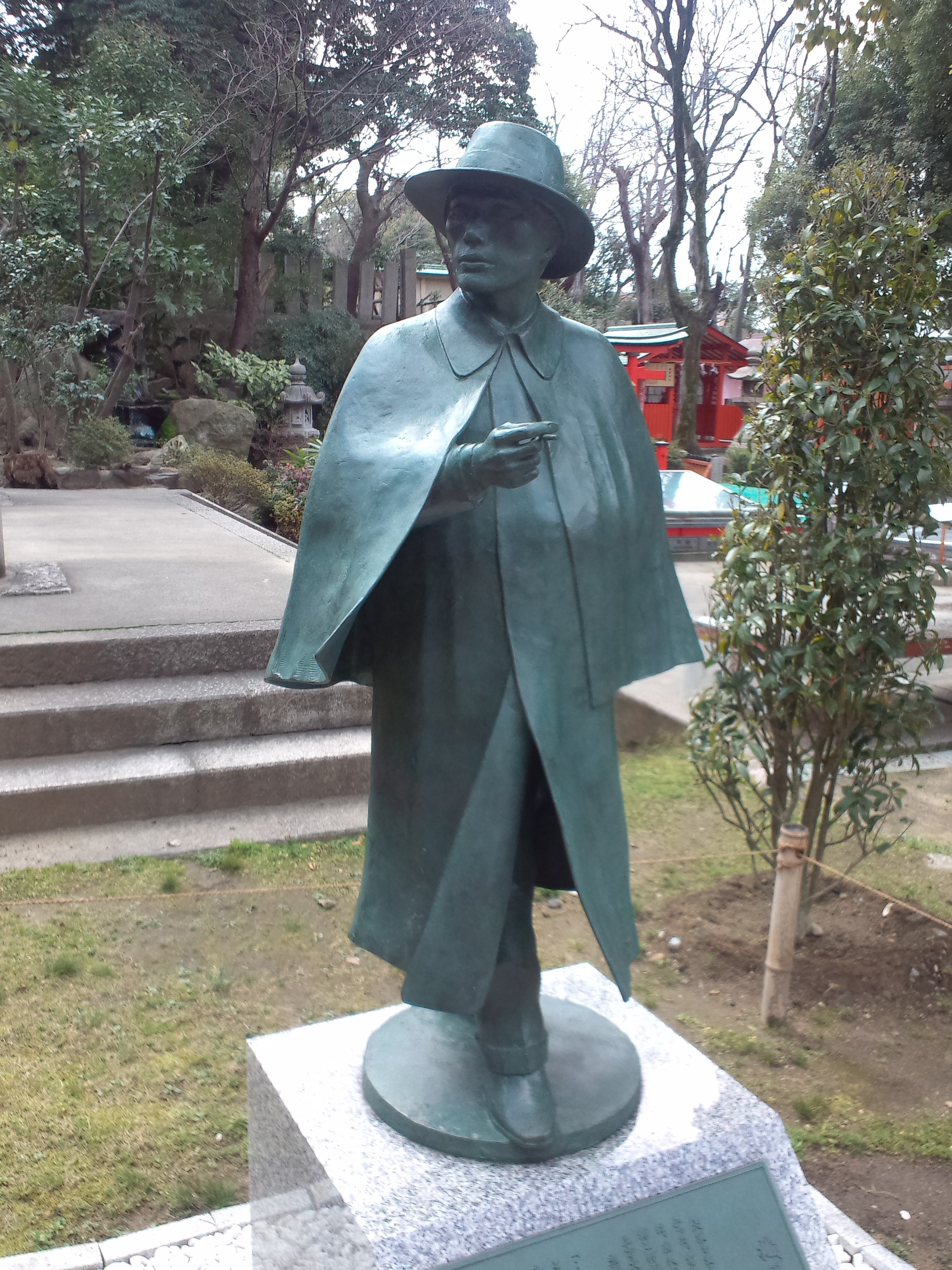 生國魂神社 織田作之助の銅像